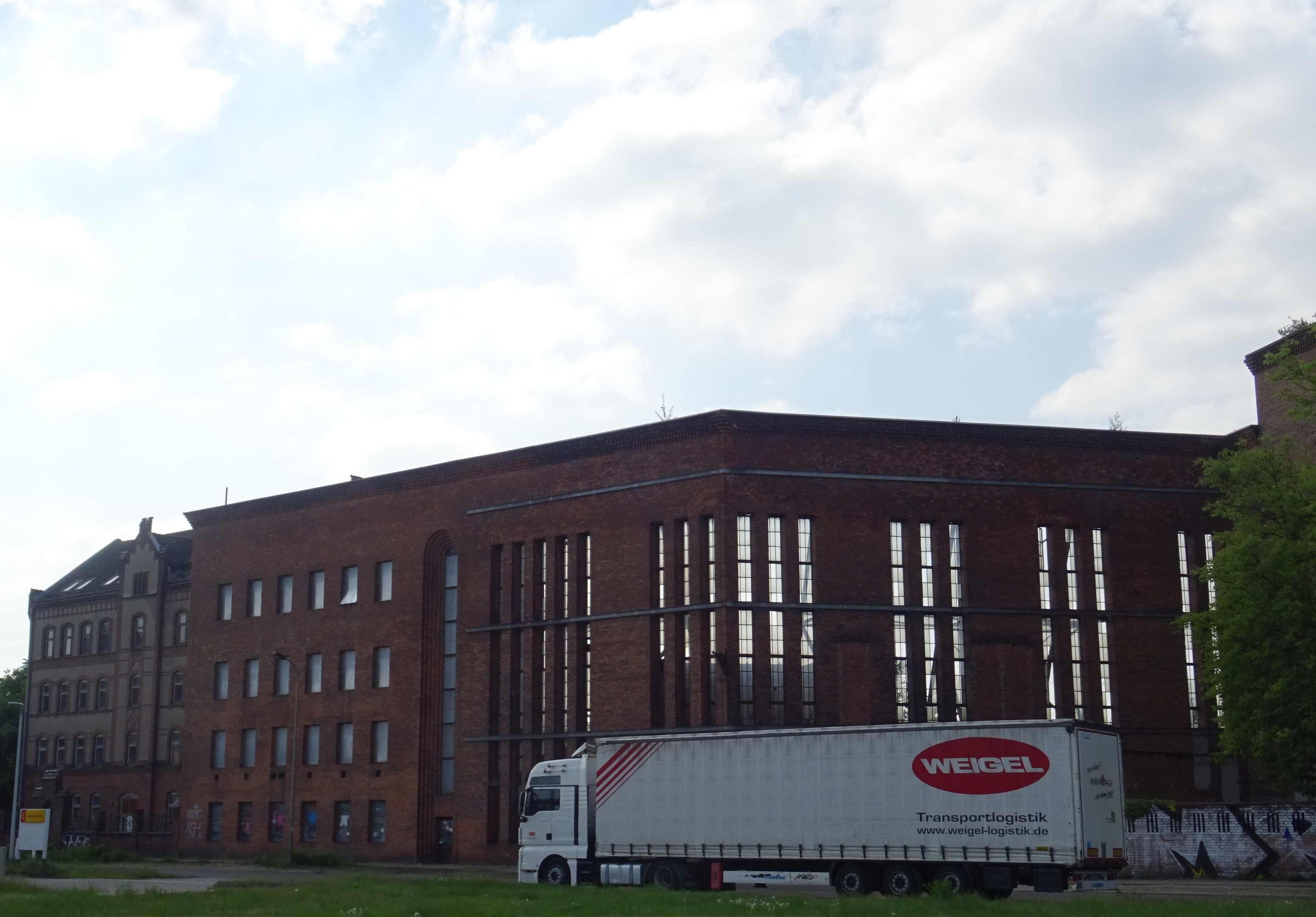 denkmalgeschütztes Kraftwerk Rummelsburg, Erweiterungsbau